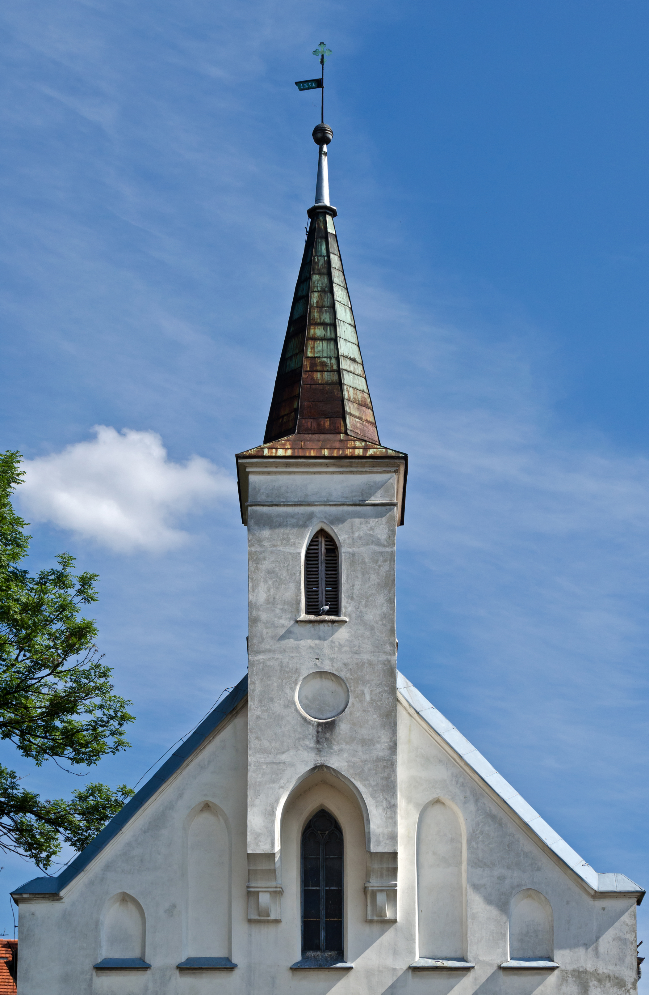 Nysa, kościół fil. p.w. Zwiastowania NMP, 2 poł. XIV, 1885